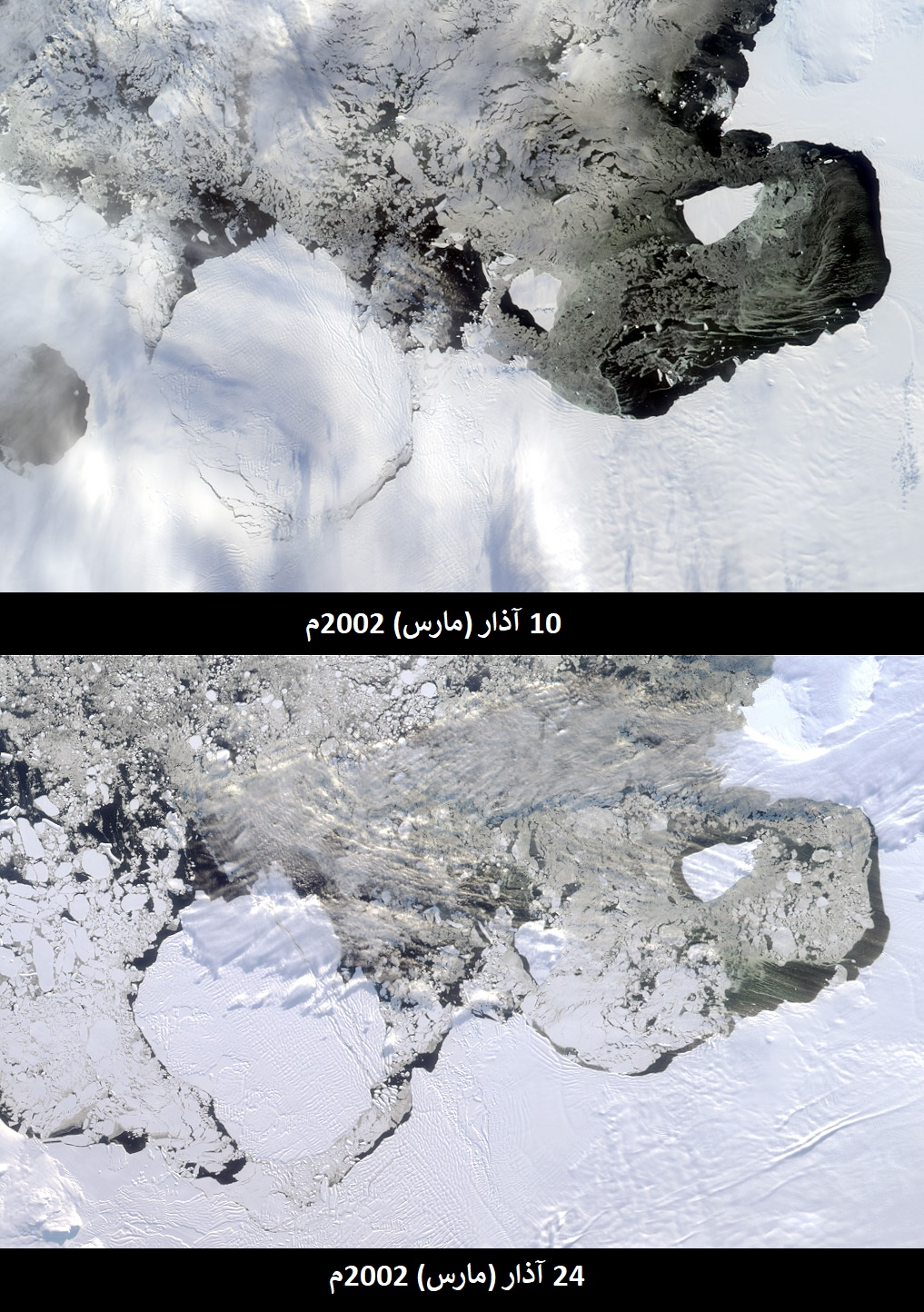 صُورة ساتليَّة للجبال الجليديَّة الطافية في بحر أموندسن. نسخة مُعرَّبة عن صُورة من إنتاج وكالة ناسا.